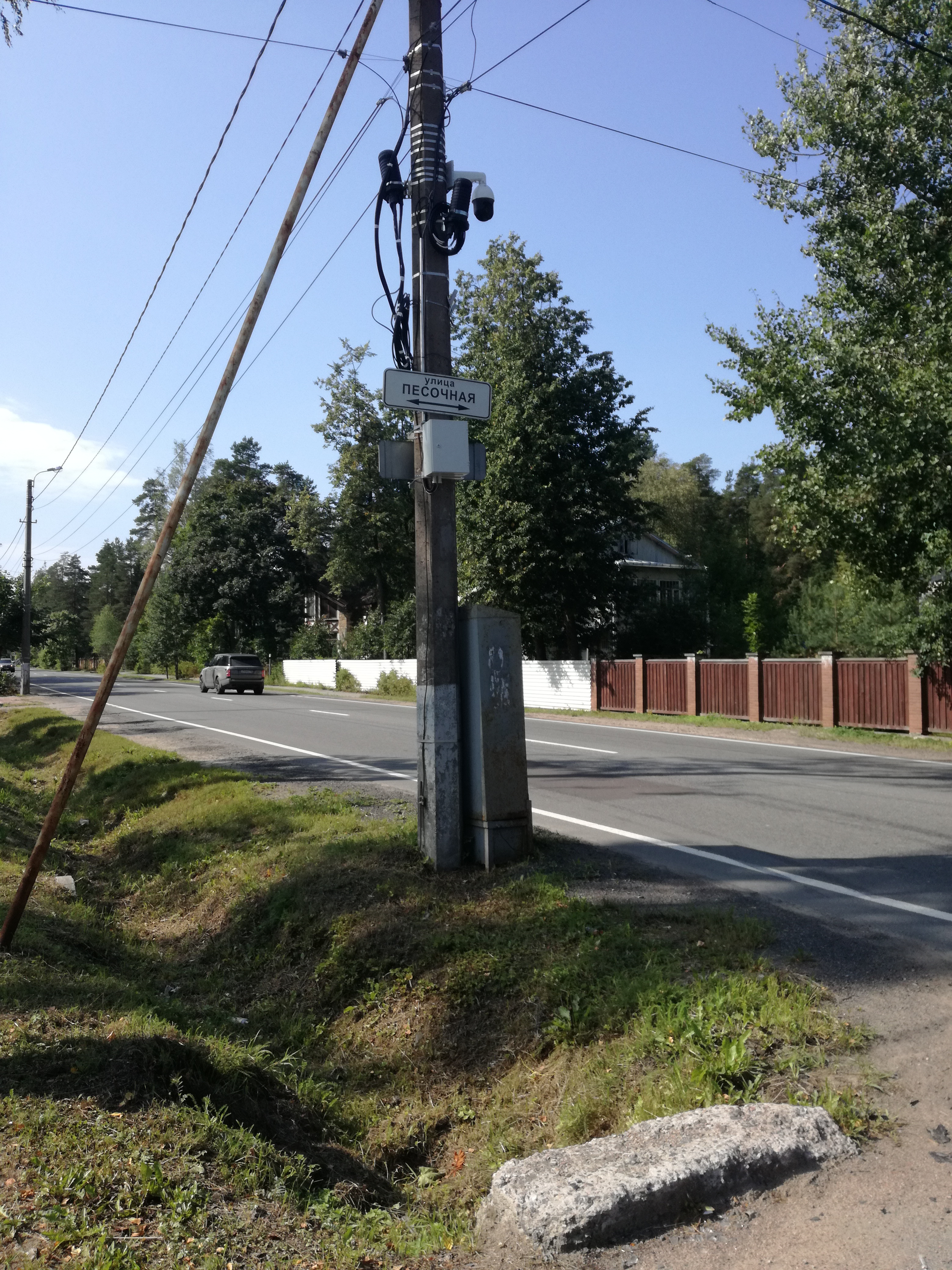 Улица Советская, Песочный